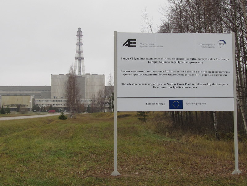 De Europese Unie, waartoe Litouwen in 2004 is toegetreden, maakte zich grote zorgen over de veiligheid van de centrale. De afgelopen jaren is veel geld geïnvesteerd in het verhogen van de veiligheid. Desondanks zag de EU de centrale liever helemaal verdwijnen. In 1999 bereikten Litouwen en de EU overeenstemming over de sluiting en de ontmanteling van de centrale. Op 31 december 2004 is de eerste reactor stilgezet. Met de EU is afgesproken dat de de centrale op 31 december 2009 geheel gesloten wordt.